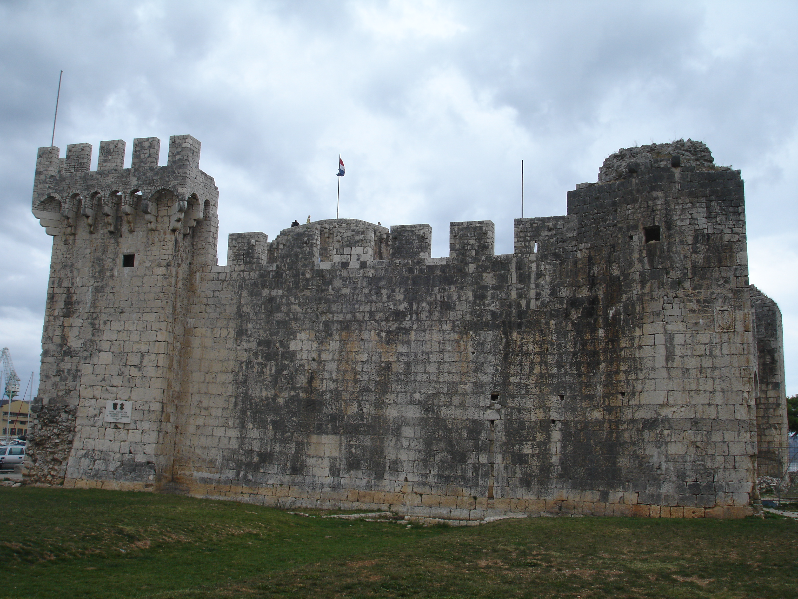 Castello Camerlengo a Trogir, Croazia